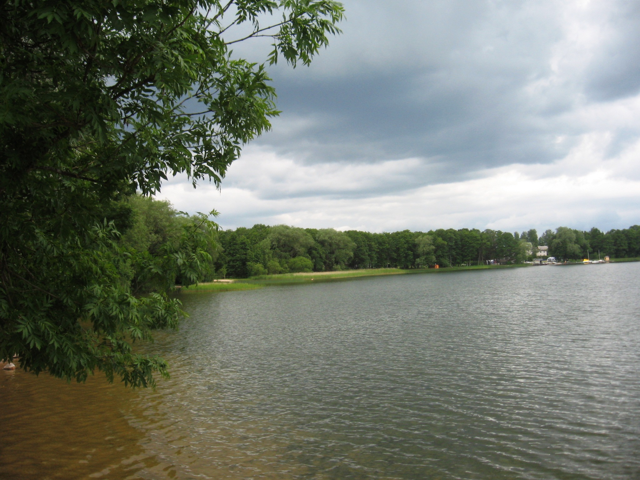 Saadjärv Vooremaal